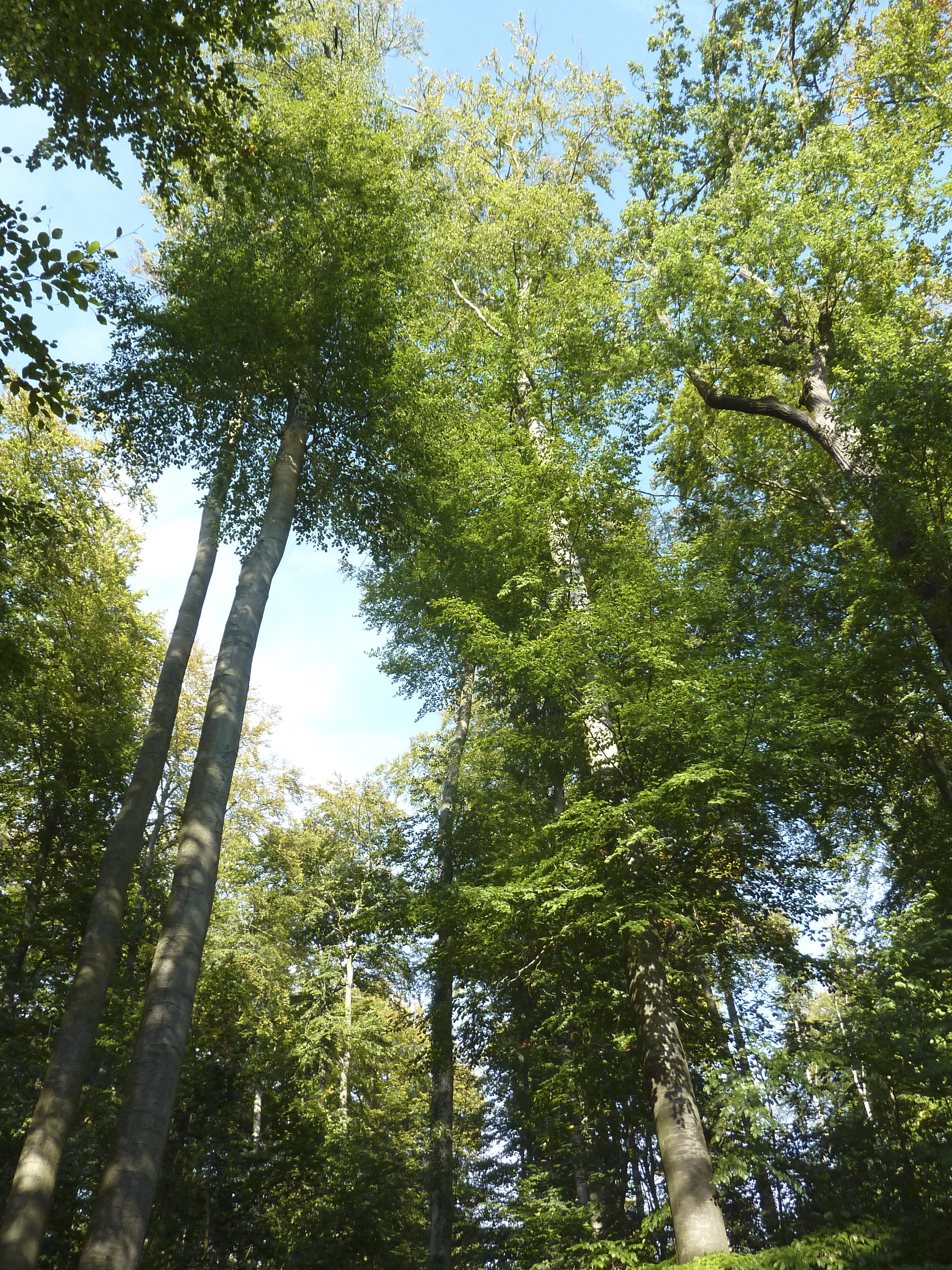 Frankfurt am Main, Stadtwald: Der Jacobiweiher auf dem Gebiet des Stadtteils Sachsenhausen wurde 1932 als Hochwasser-Rückhaltebecken angelegt. Mit einer Wasserfläche von sechs Hektar ist er Frankfurts größtes Stillgewässer. Die am Jacobiweiher stehenden Buchen erreichen eine Wuchshöhe von bis zu 40 Metern